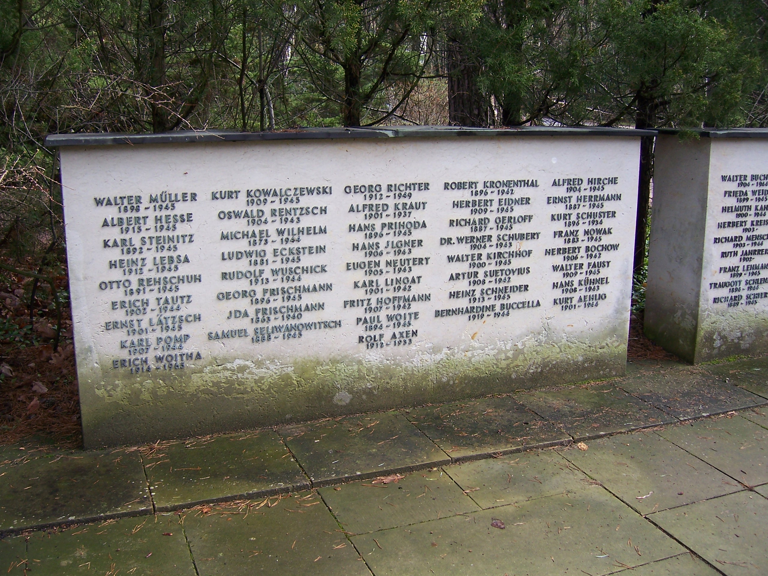 Symbolische Grabstätten im Ehrenhain des Dresdner Heidefriedhofs, der Namensblock ist einer von dreien des Ehrenhains, der ausschließlich symbolische Grabstätten zeigt.